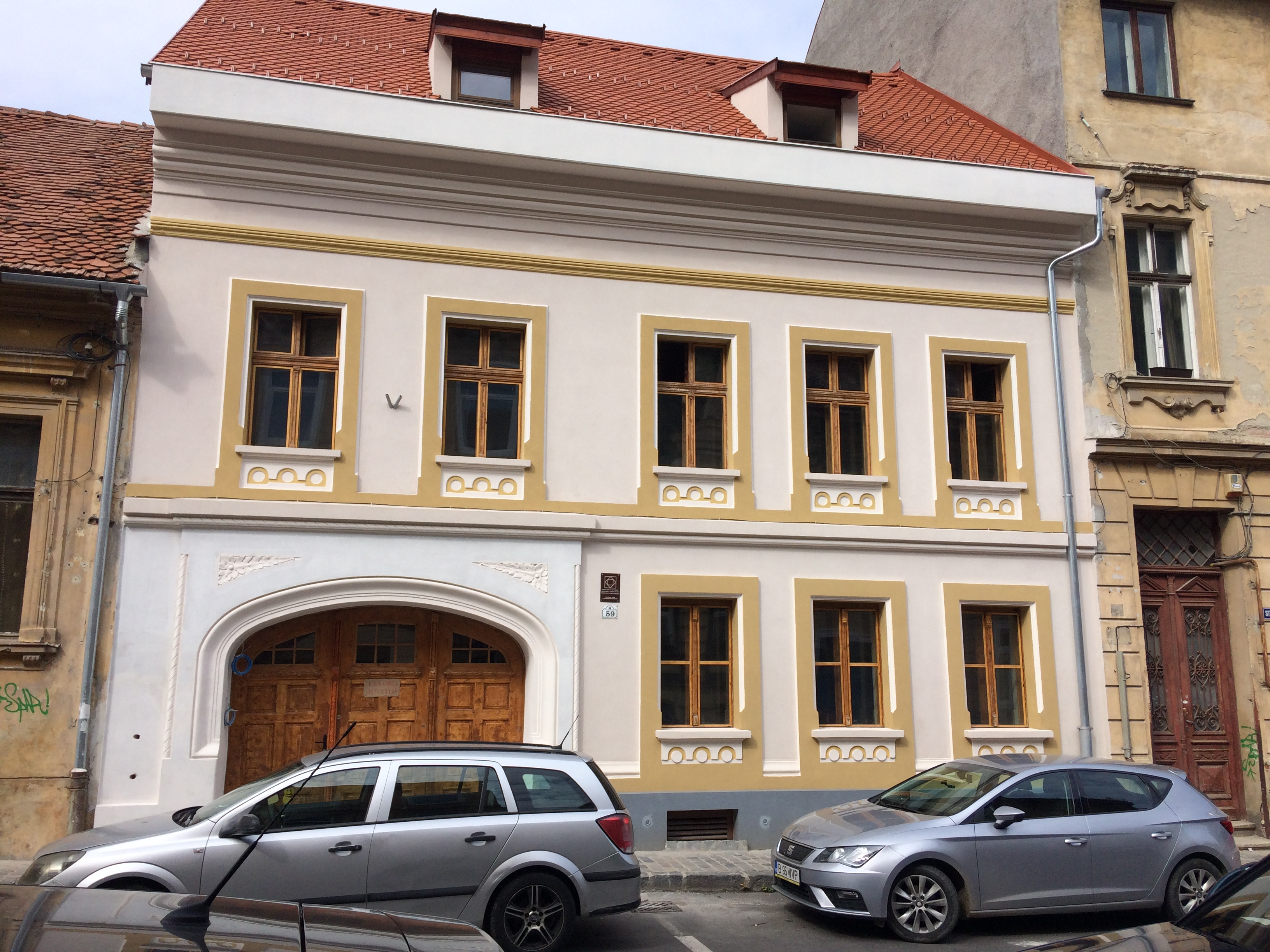 Casă monument istoric